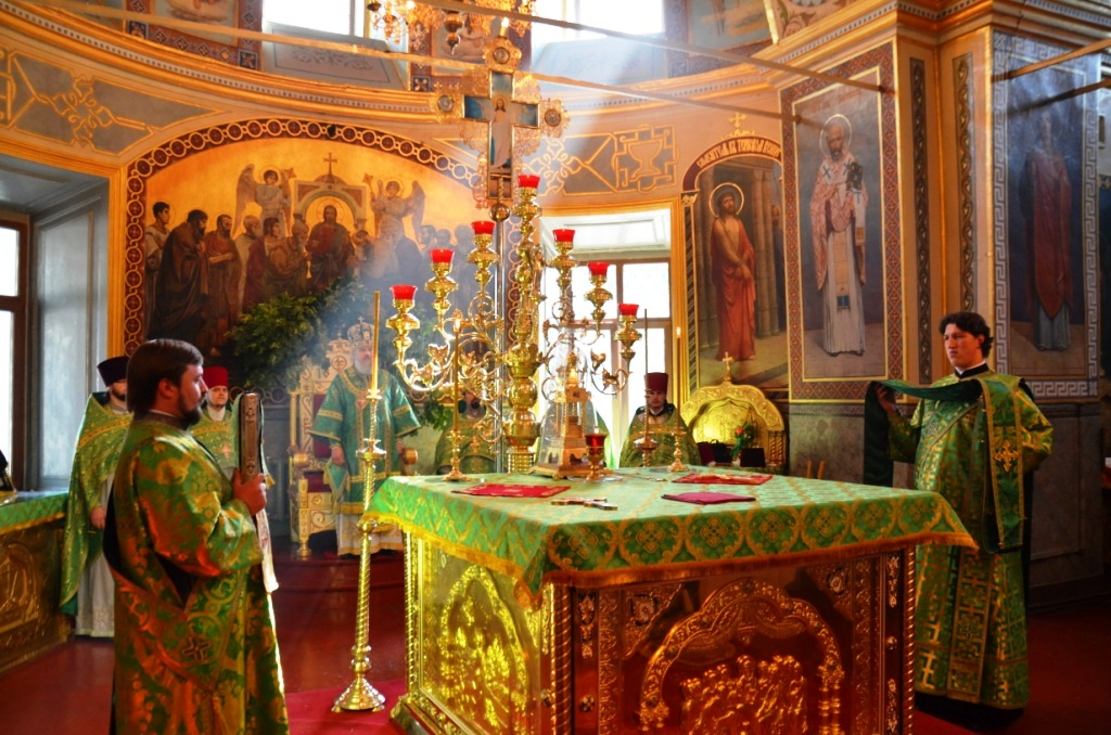 День Святой Троицы. Пятидесятница. 31.05.2015.